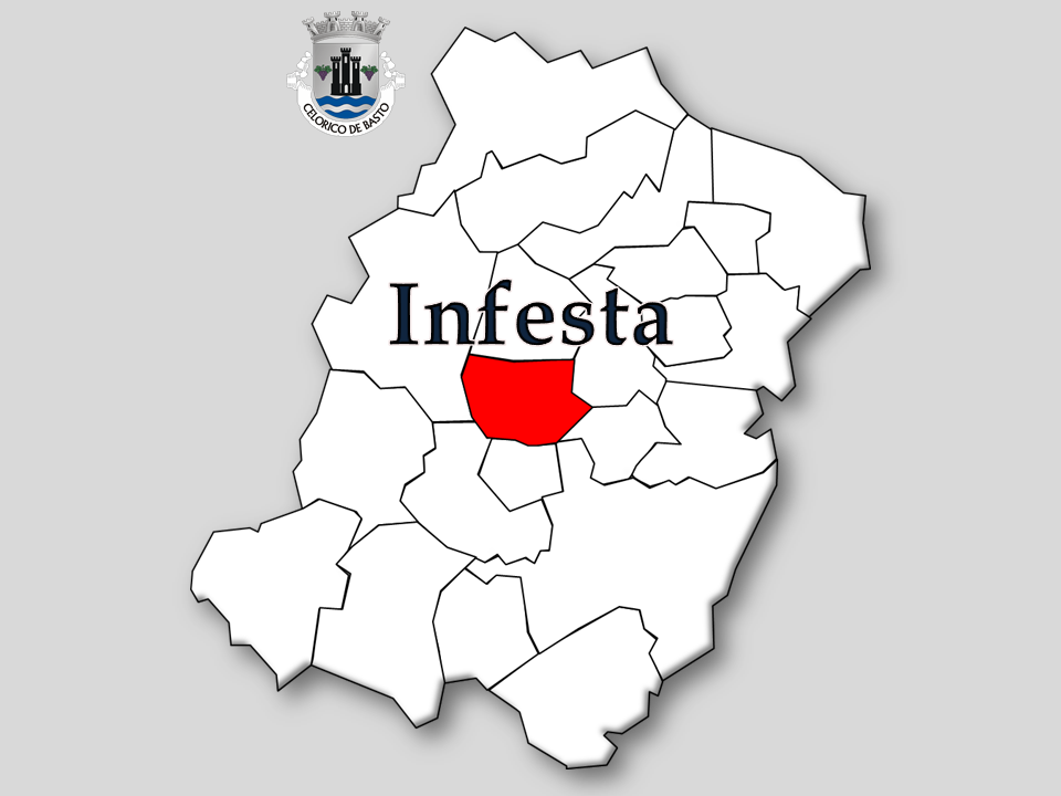 Censos 1864/2011